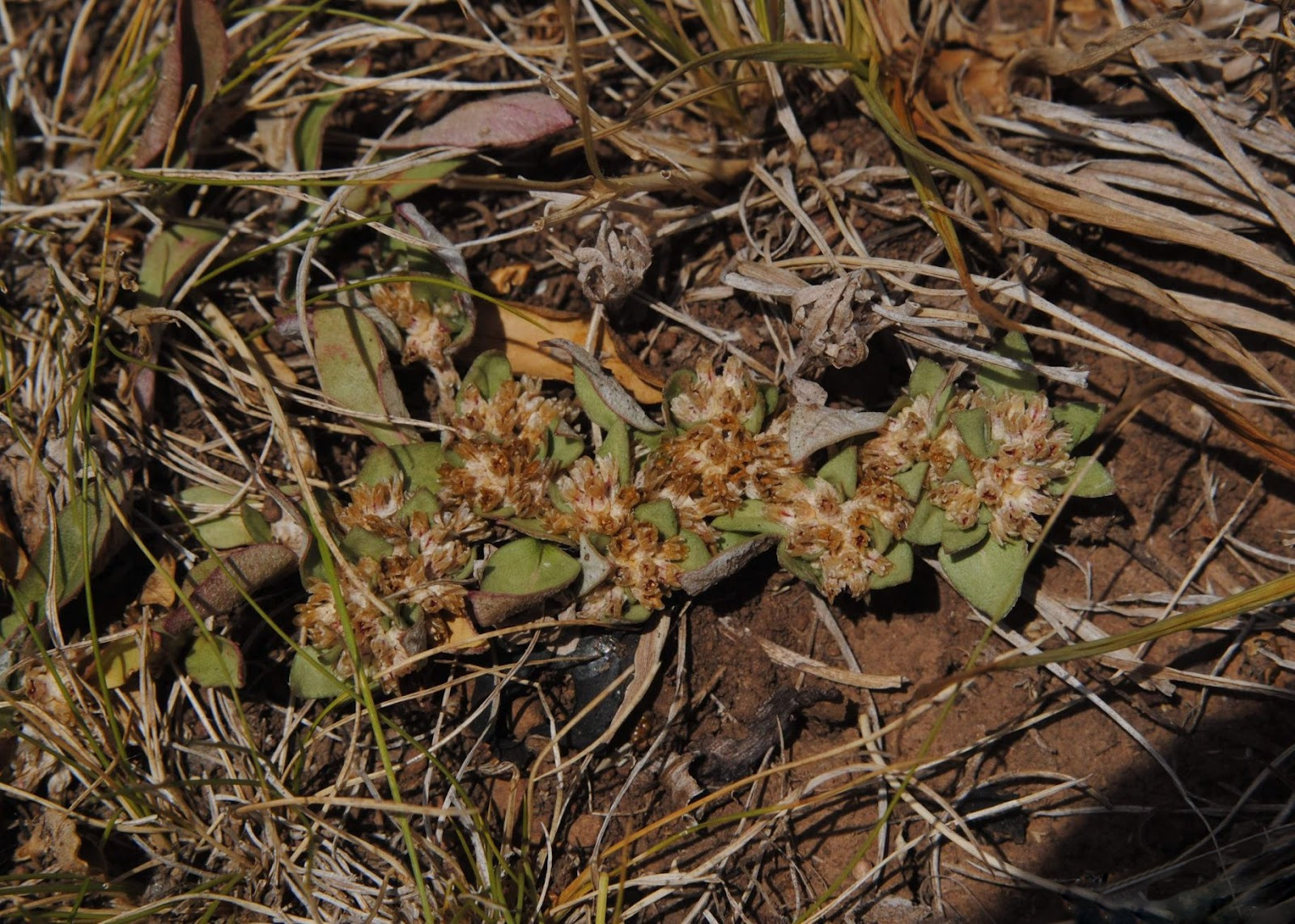 Guilleminea elongata. Amaranthaceae. Fotos tomadas sobre basalto en la Cuchilla del Rincón, Los Rodríguez, departamento de Tacuarembó, Uruguay